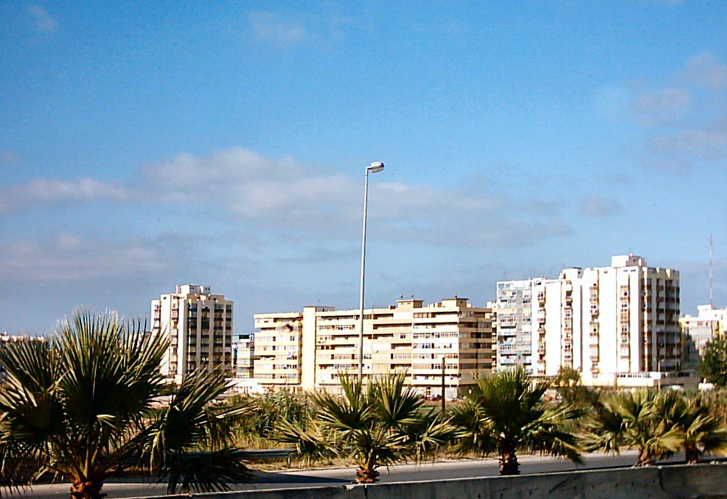 Vista da Costa de Caparica, Almada, Portugal.